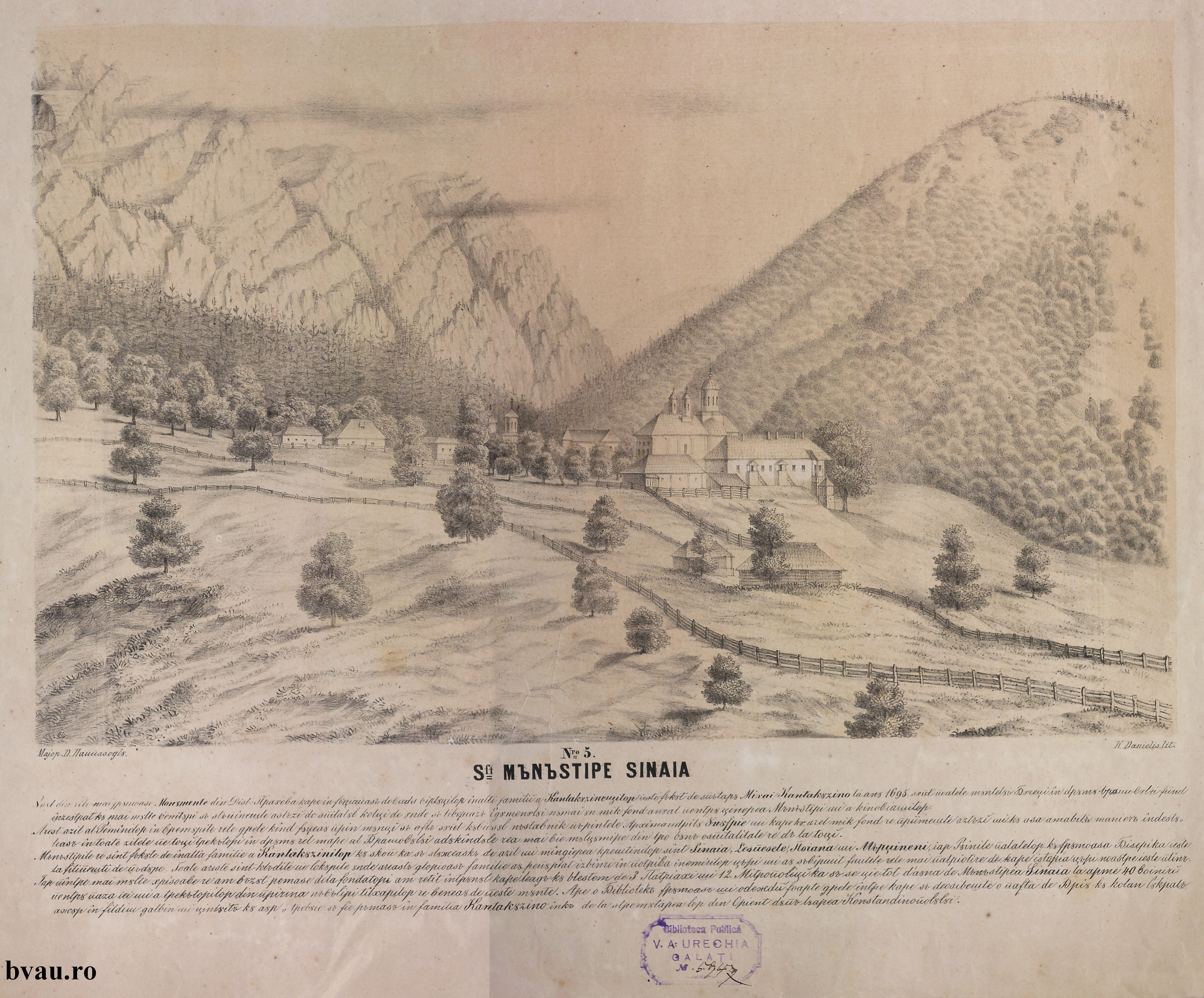 Editor D. Pappasoglu Mânăstirea Sinaia